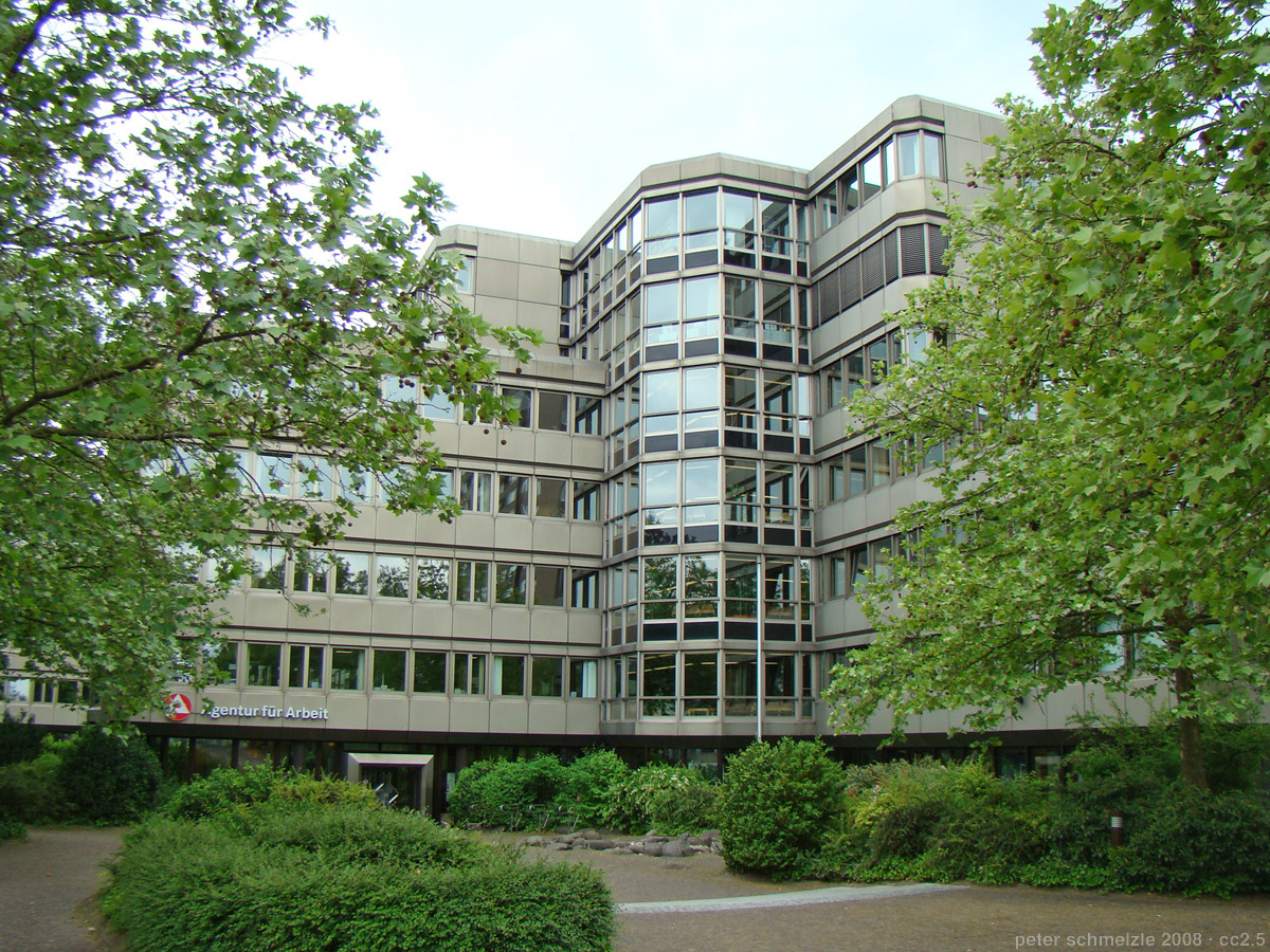 Arbeitsamtsgebäude (heute: Agentur für Arbeit) am Rosenberg in Heilbronn